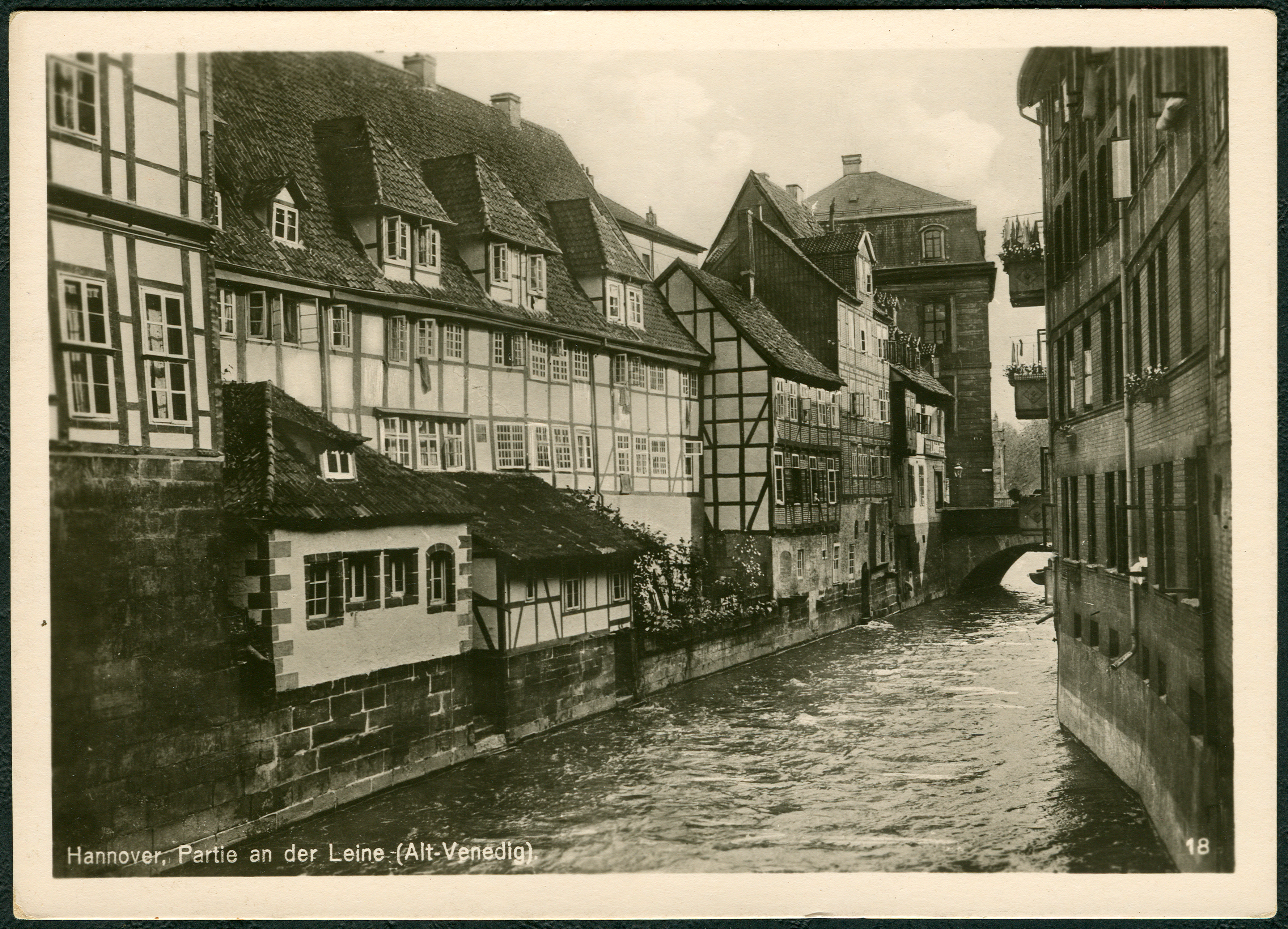 Blick um 1900 leineaufwärts in Richtung Leintorbrücke und Leineschloss: Die dichte Fachwerk-Bebauung beiderseits der Leine (die Häuser rechts gehörten zur sogenannten "Leineinsel Klein-Venedig") überstand die Feuerstürme während der Luftangriffe auf Hannover im Zweiten Weltkrieg nicht. Auf der linken Bildseite finden sich heute die Rademachertreppe und der gastronomisch genutzte Klostergang ...